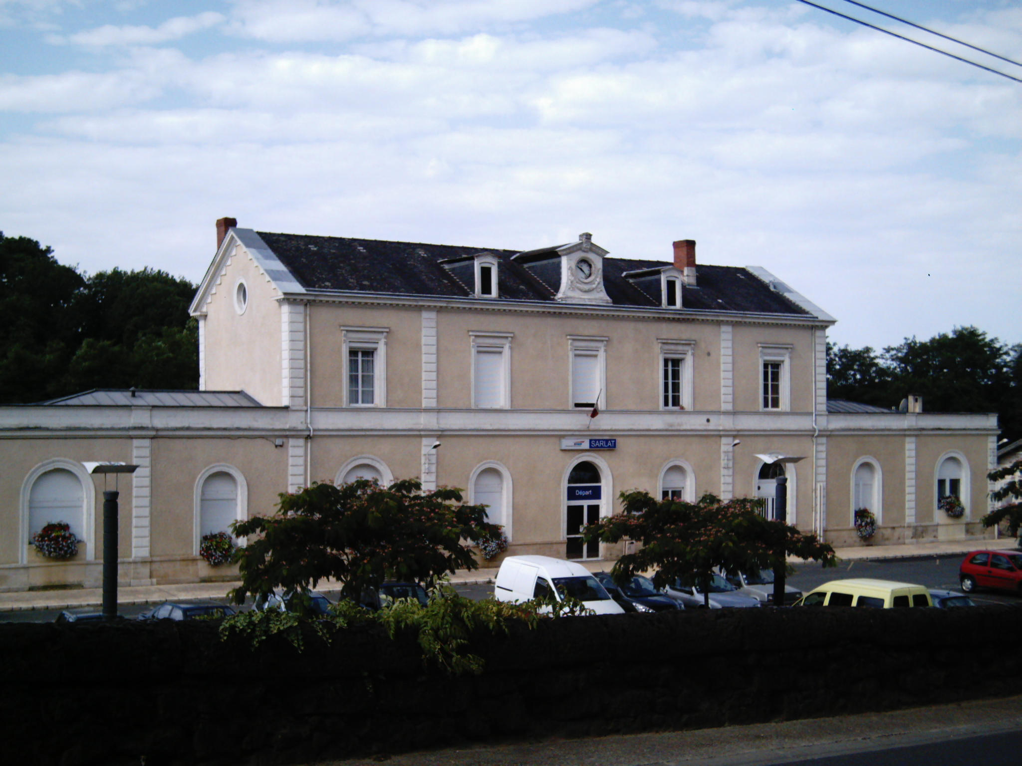 La Gare de Sarlat-la-Canéda, en 2007.